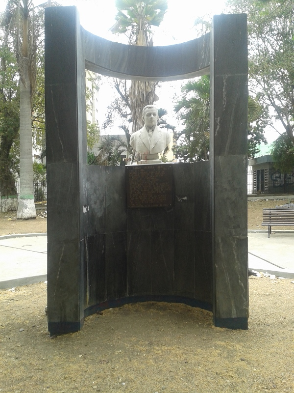 Pedestal del celebre doctor venezolano